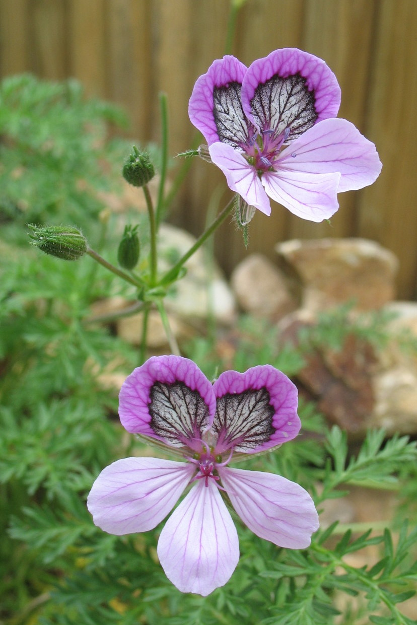 Erodium petraeum ssp. glandulosum. Jardín botánico de las Pardines. Encamp, Andorra.